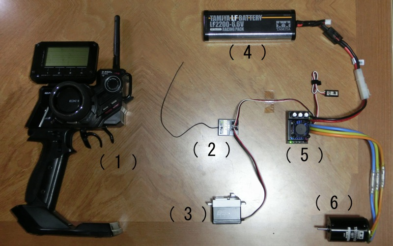 電動RCカー用のRCシステム紹介 (1)送信機, (2)受信機, (3)ステアリングサーボ (4)走行用バッテリー, (5)ESC, (6)走行用ブラシレスモーター